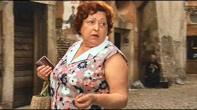 Screenshot del film Trastevere (1971) di Fausto Tozzi